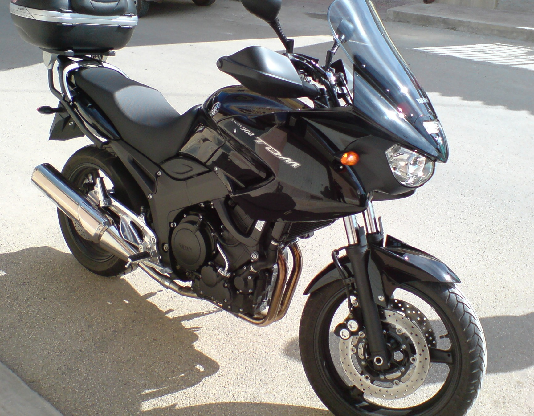 Una Yamaha Tdm 900 del 2008